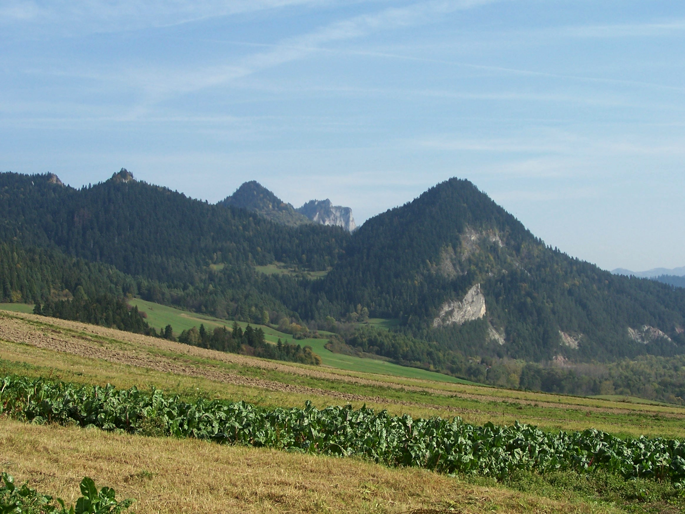 Od lewej: Gumionek, Cyrlowa Skała, Nowa Góra,Trzy Korony, Macelowa Góra